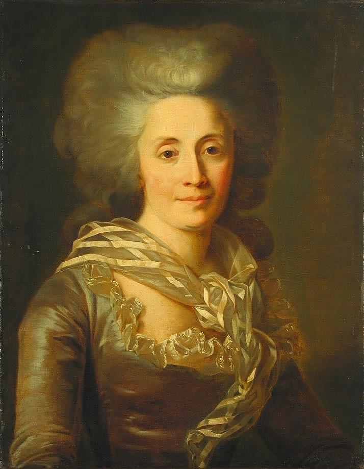 Баронесса Иоганна (Маргарита) Фёдоровна Николаи, ур. Поггенполь (1738/1747—1820)